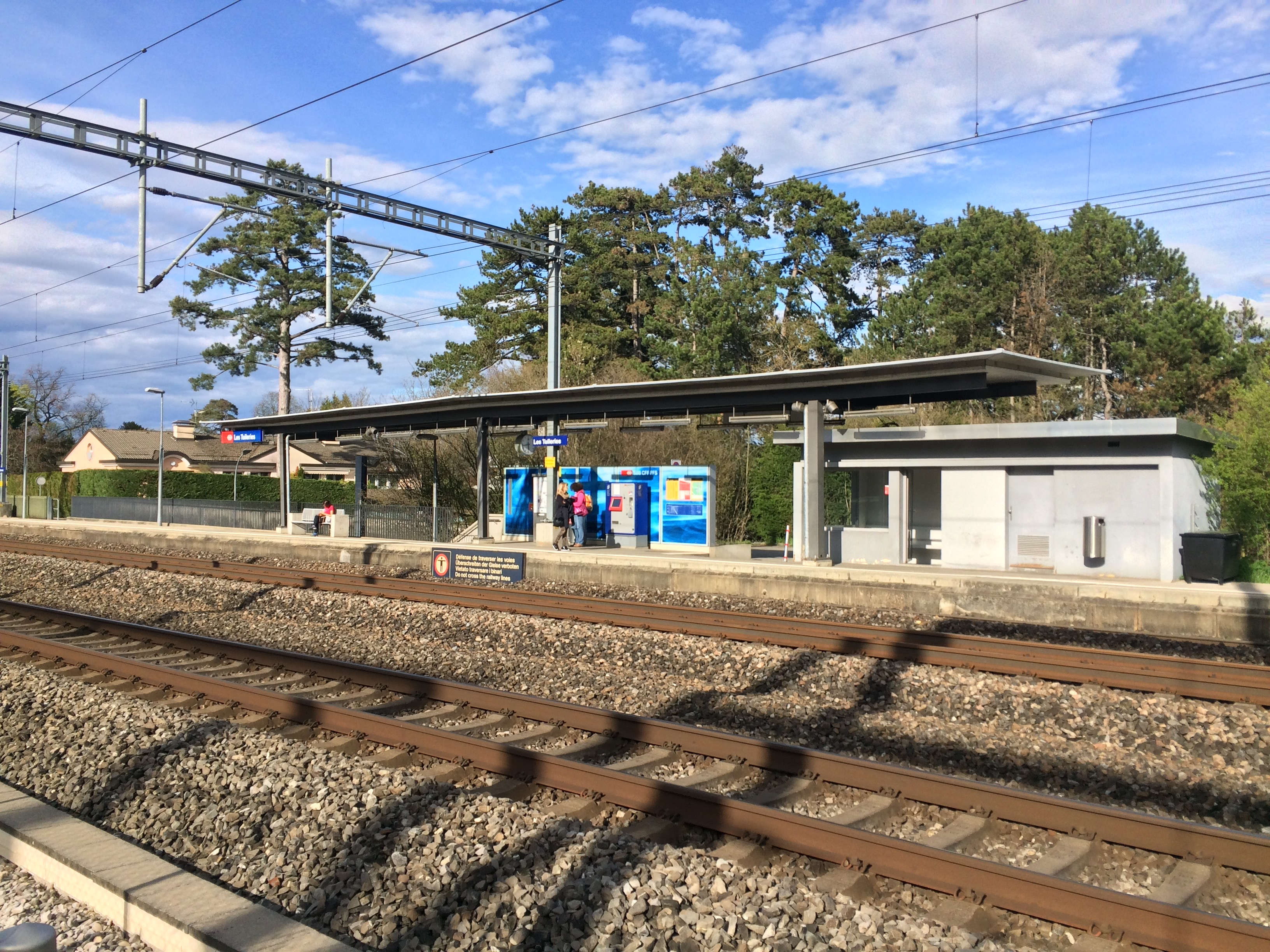 La gare des Tuileries, dans la commune genevoise de Bellevue.